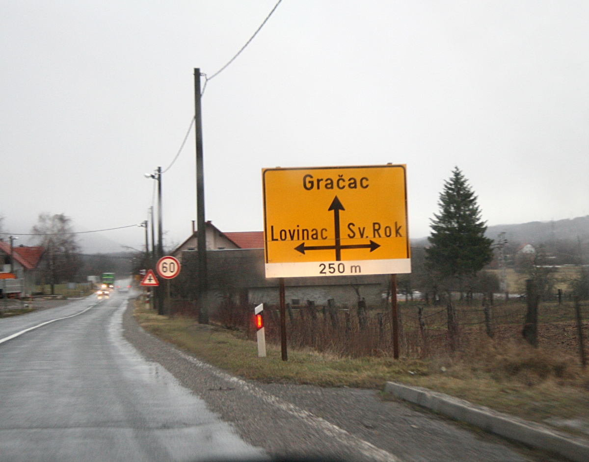 Zagreb_Split